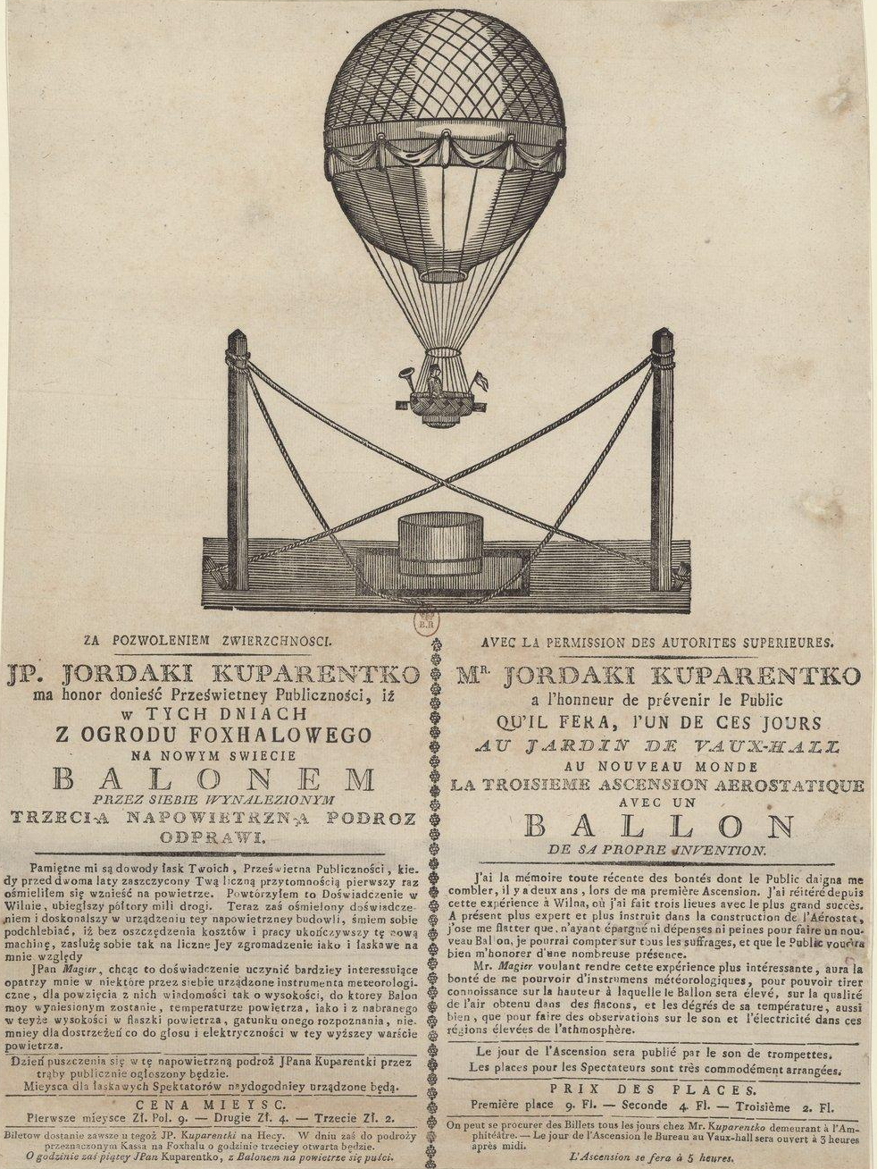 Avec la permission des autorités supérieures. Mr. Jordaki Kuparentko a l'honneur de prévenir le public qu'il fera l'un de ces jours au jardin de Vaux-Hall au Nouveau Monde la troisième ascension aerostatique avec un ballon de sa propre invention.